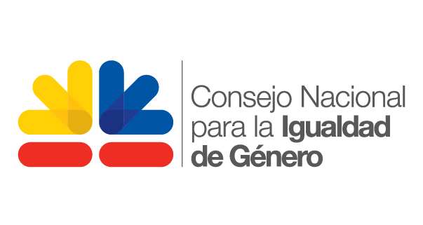 igualdad de genero